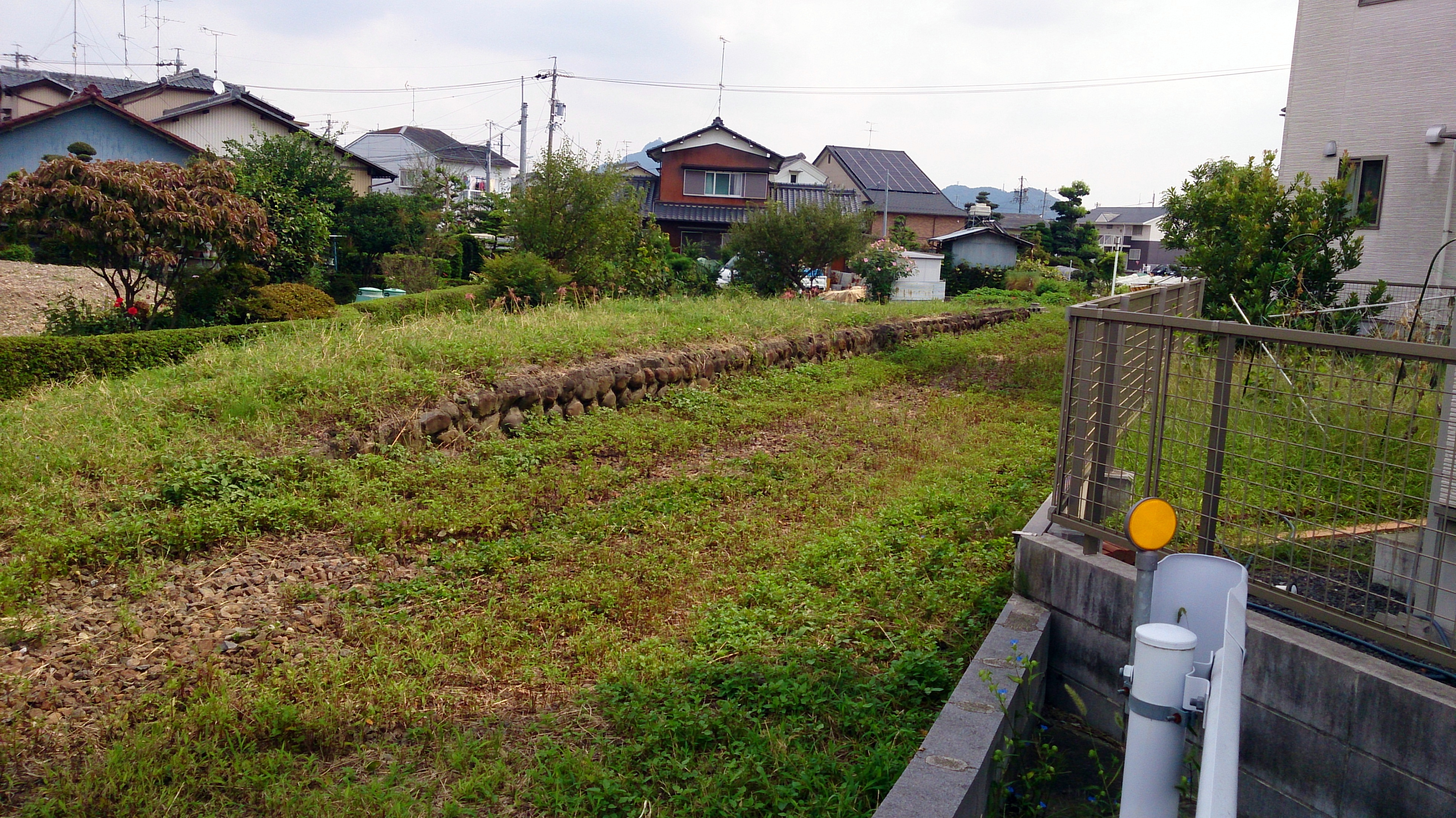 1944年（昭和19年）に休止扱いとなり、1969年（昭和44年）4月5日 に正式に廃止扱いにホーム跡。 2005年（平成17年）に揖斐線全線で廃止された別の駅と違い、石積みで構築されている。